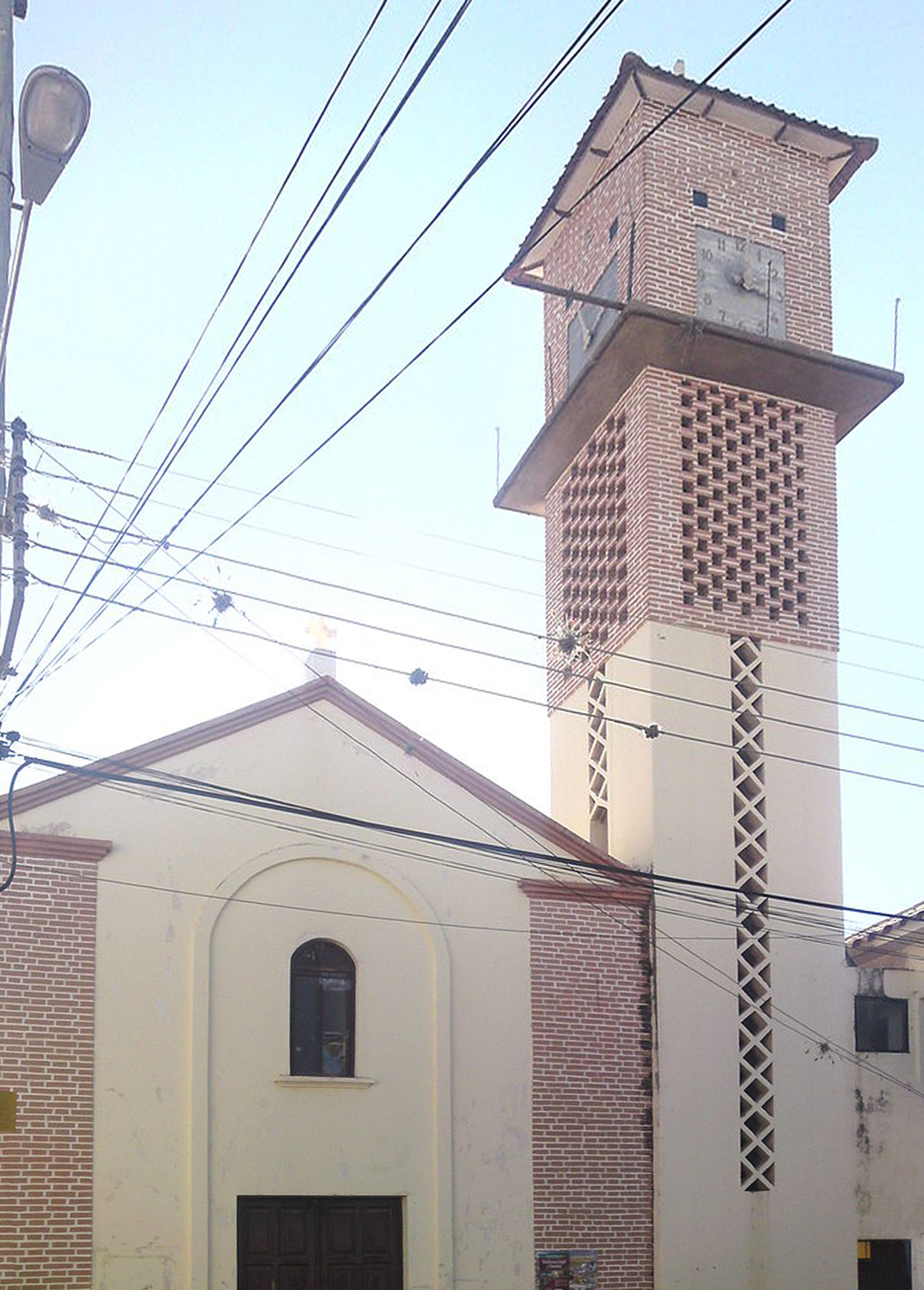 La catedral catolica de la Villa de Yotala